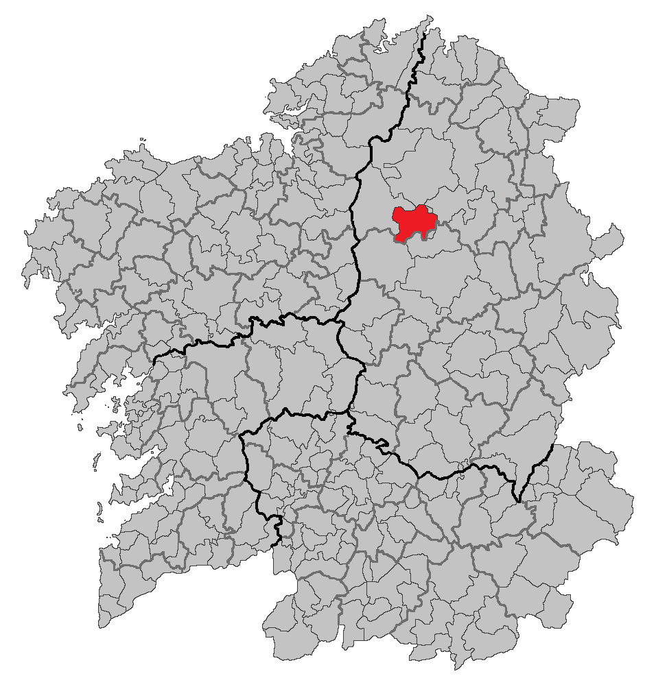 Mapa coa localización do concello de Begonte.